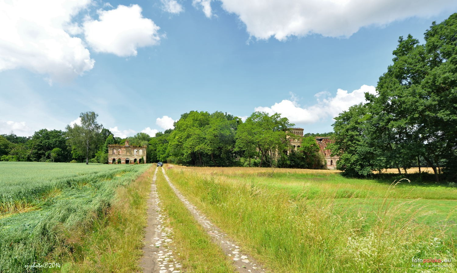 Amerykan